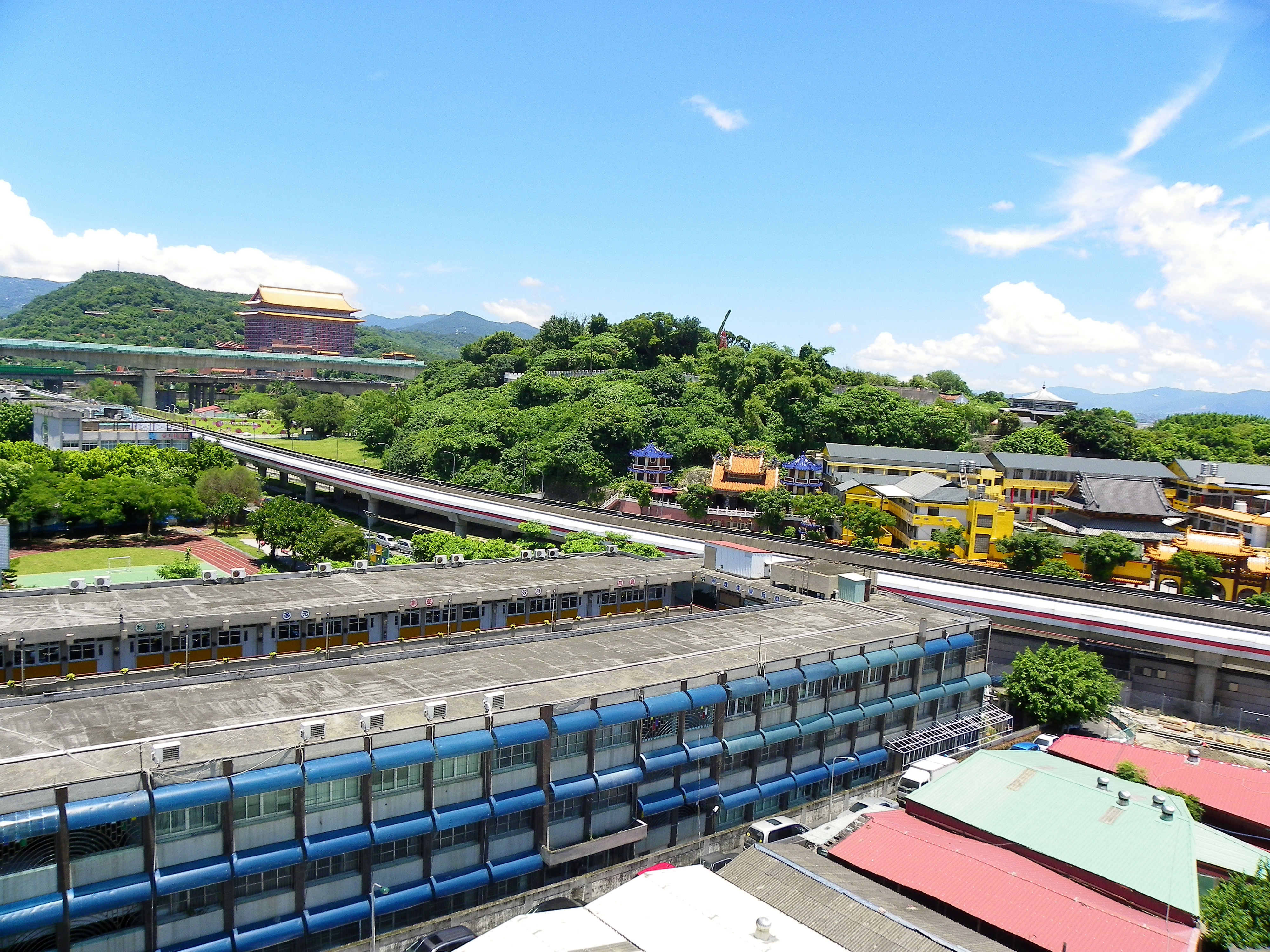 台北捷運淡水線円山駅～剣潭駅間。淡水線の西側（手前）は台北市立明倫国民小学、東側は臨済護国禅寺と円山。北の中山高速公路の奥は円山大飯店と剣潭山。